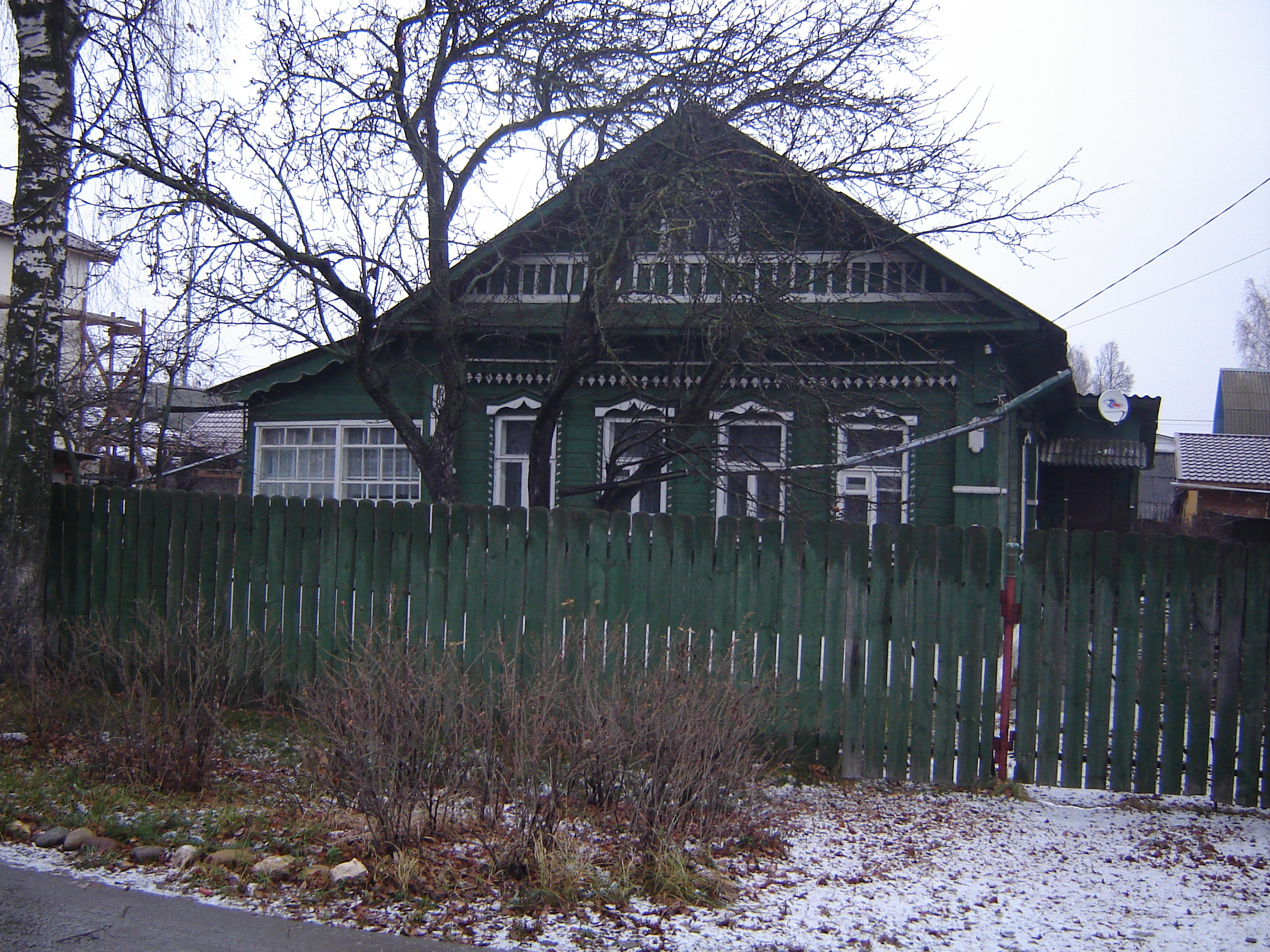 Дом в г. Дмитрове по Песчаной улице , построенный по финской каркасно-щитовой технологии в Советское время